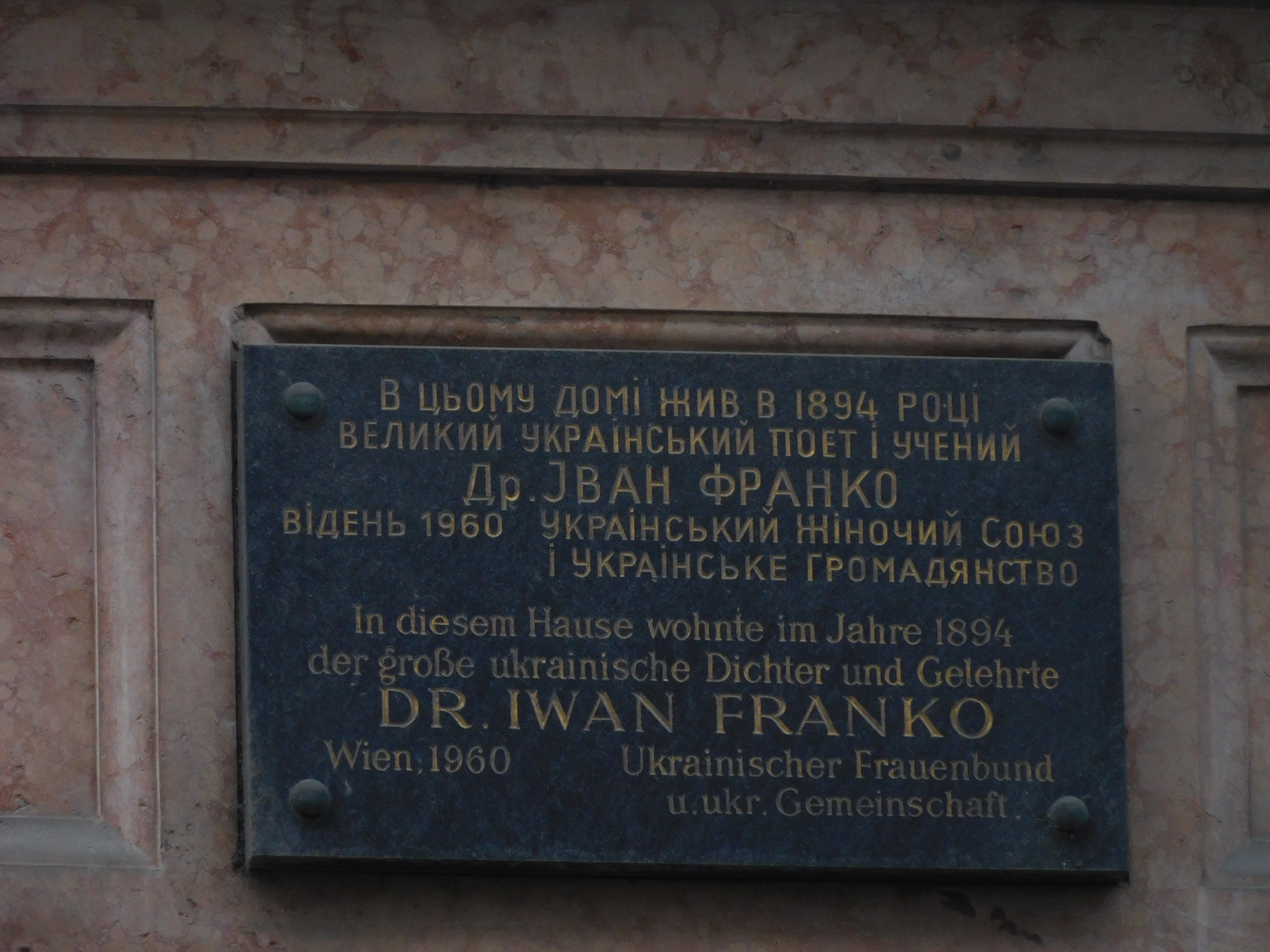 Будинок у Відні, де жив Іван Франко